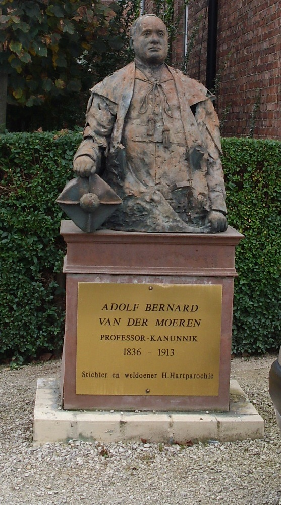 Kanunnik Adolf Van der Moeren (1836-1913) - Kerkplein - Durmen - Zele - Oost-Vlaanderen - Vlaanderen - België